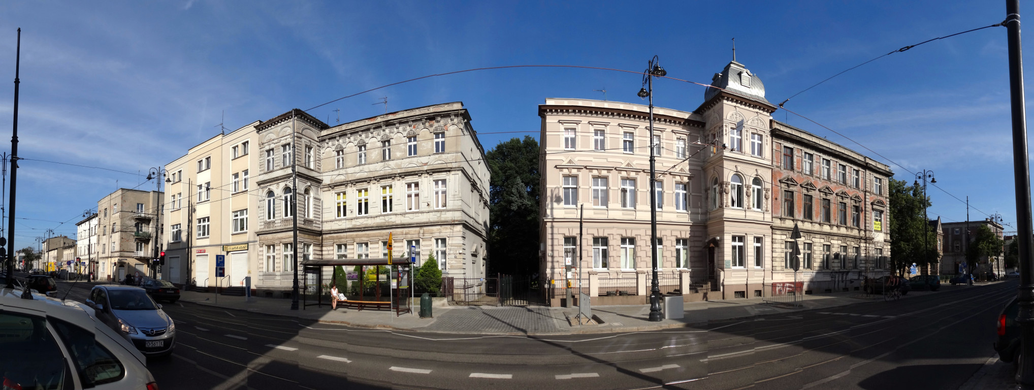 Ulica Gdańska w Bydgoszczy